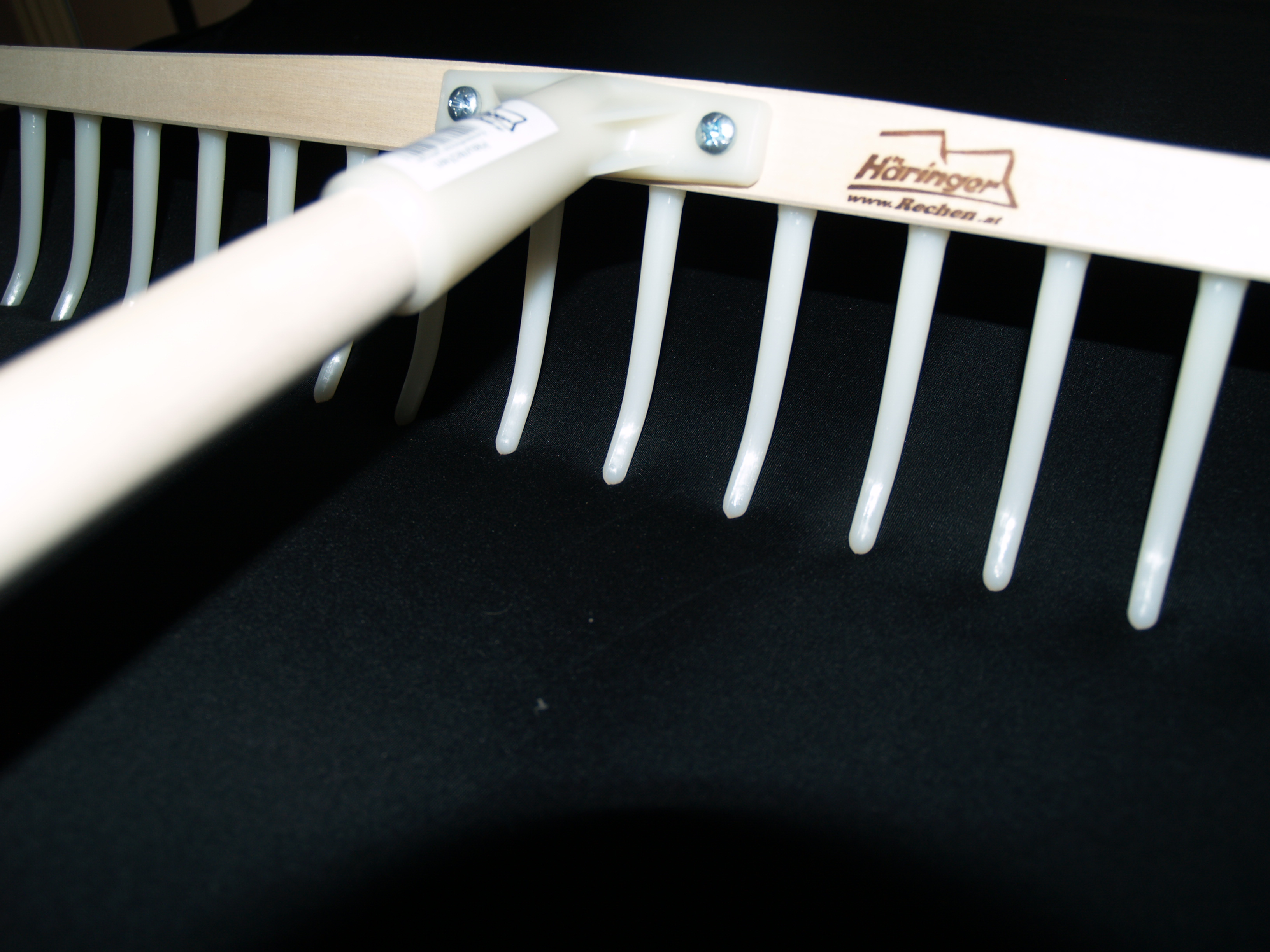 Kunststoffzinken an einem Heurechen